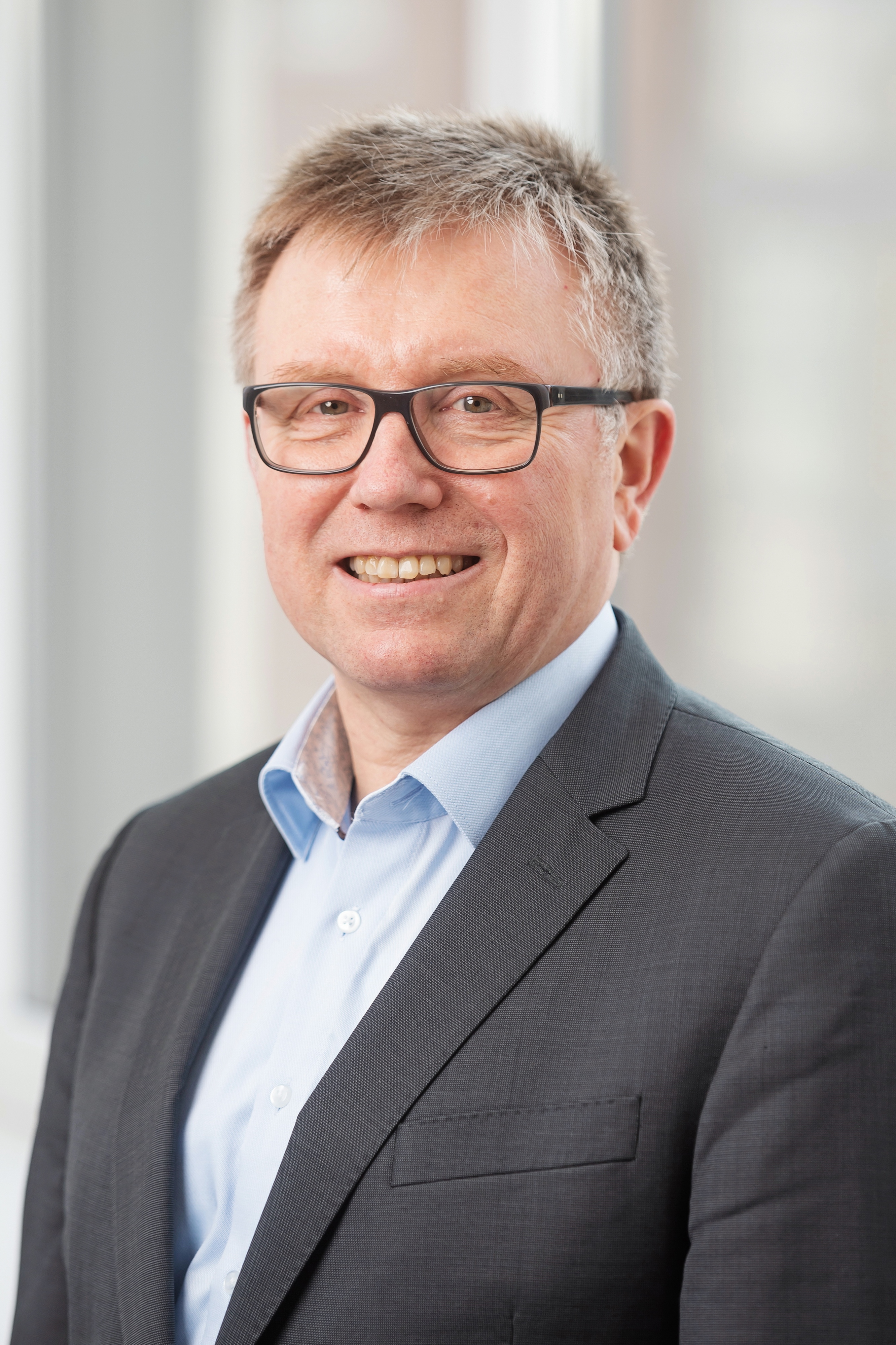 Bremer Europaabgeordneter Joachim Schuster MdEP 2020